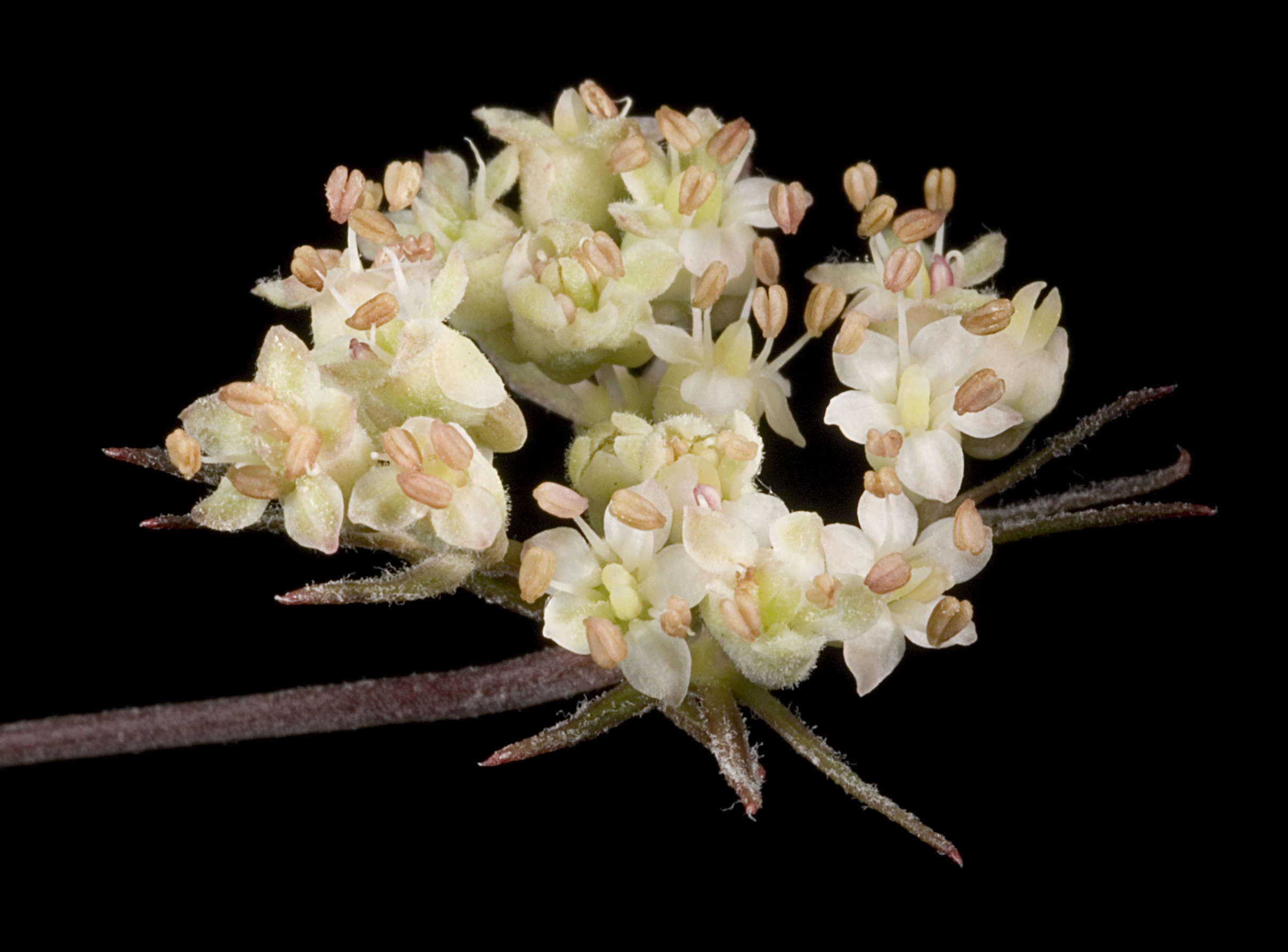 KRT3494